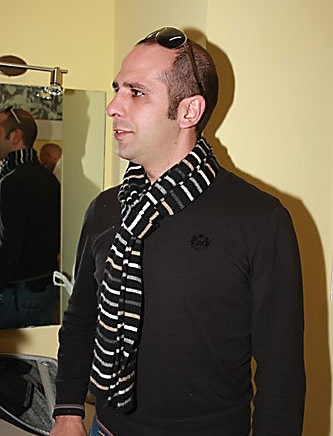 Tipo Divertente!